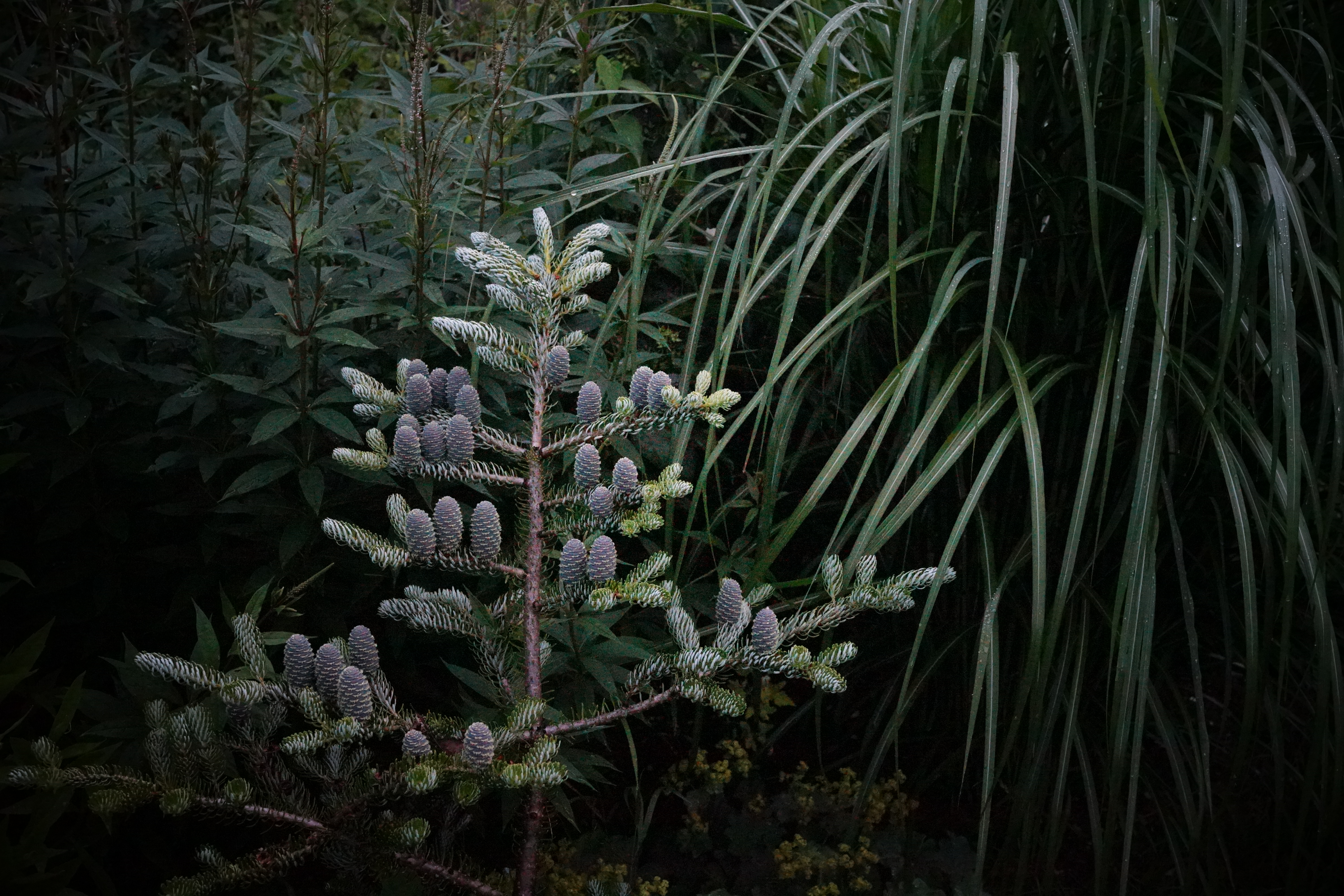 Abies koreana 'Horstmann's Silberlocke' & Miscanthus sinensis Владимирская область. Россия.